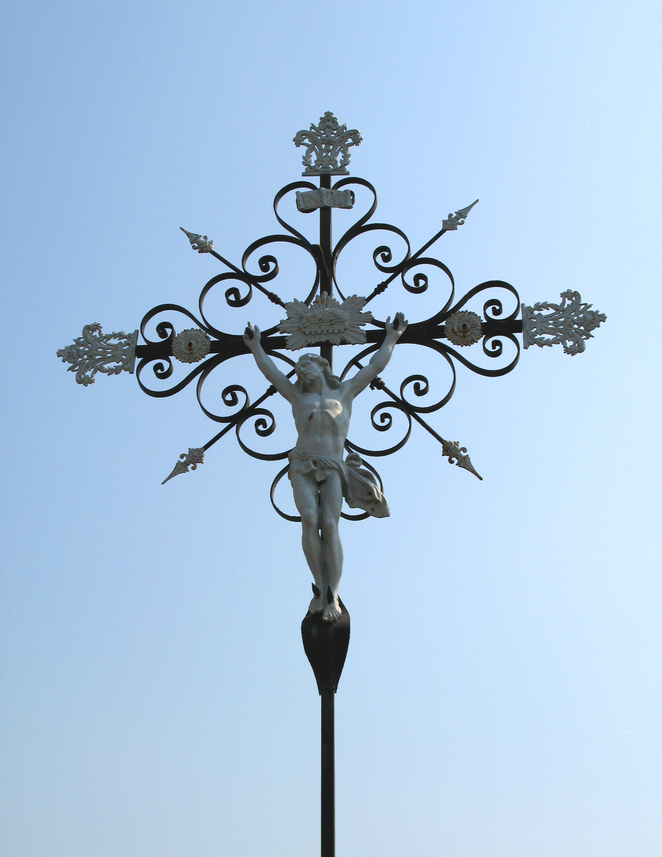 Cavillon (Somme, France)